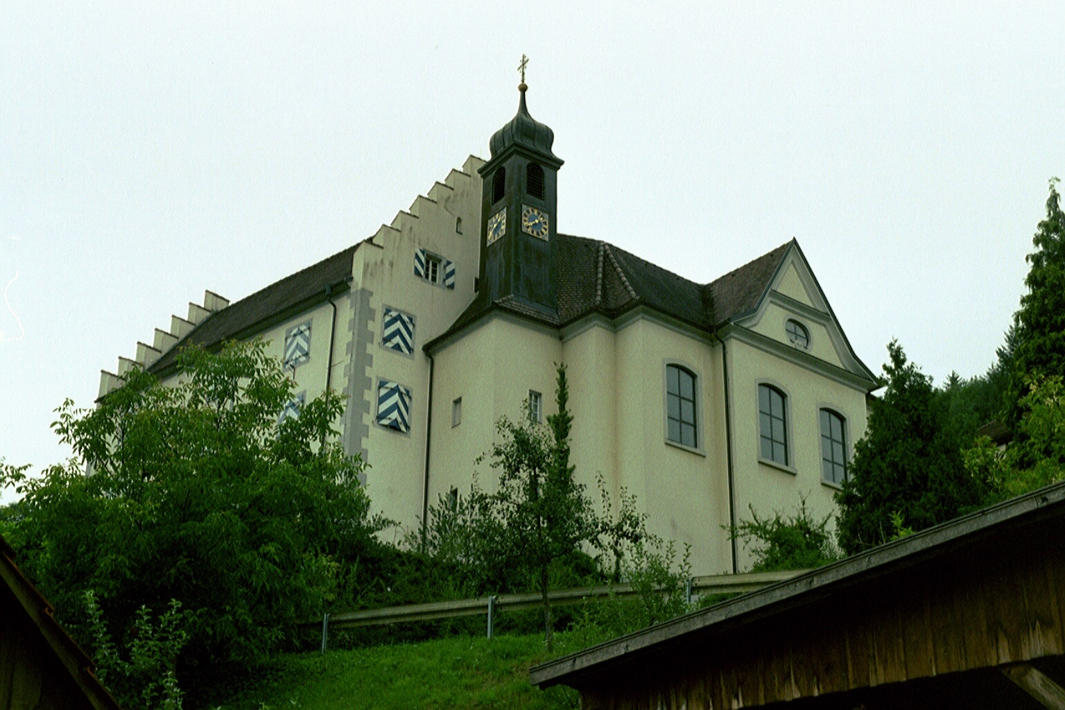 Benediktinerinnenkloster (Marienkloster) aus dem 19. Jhdt. in Ofteringen (Wutöschingen), Baden-Württemberg.